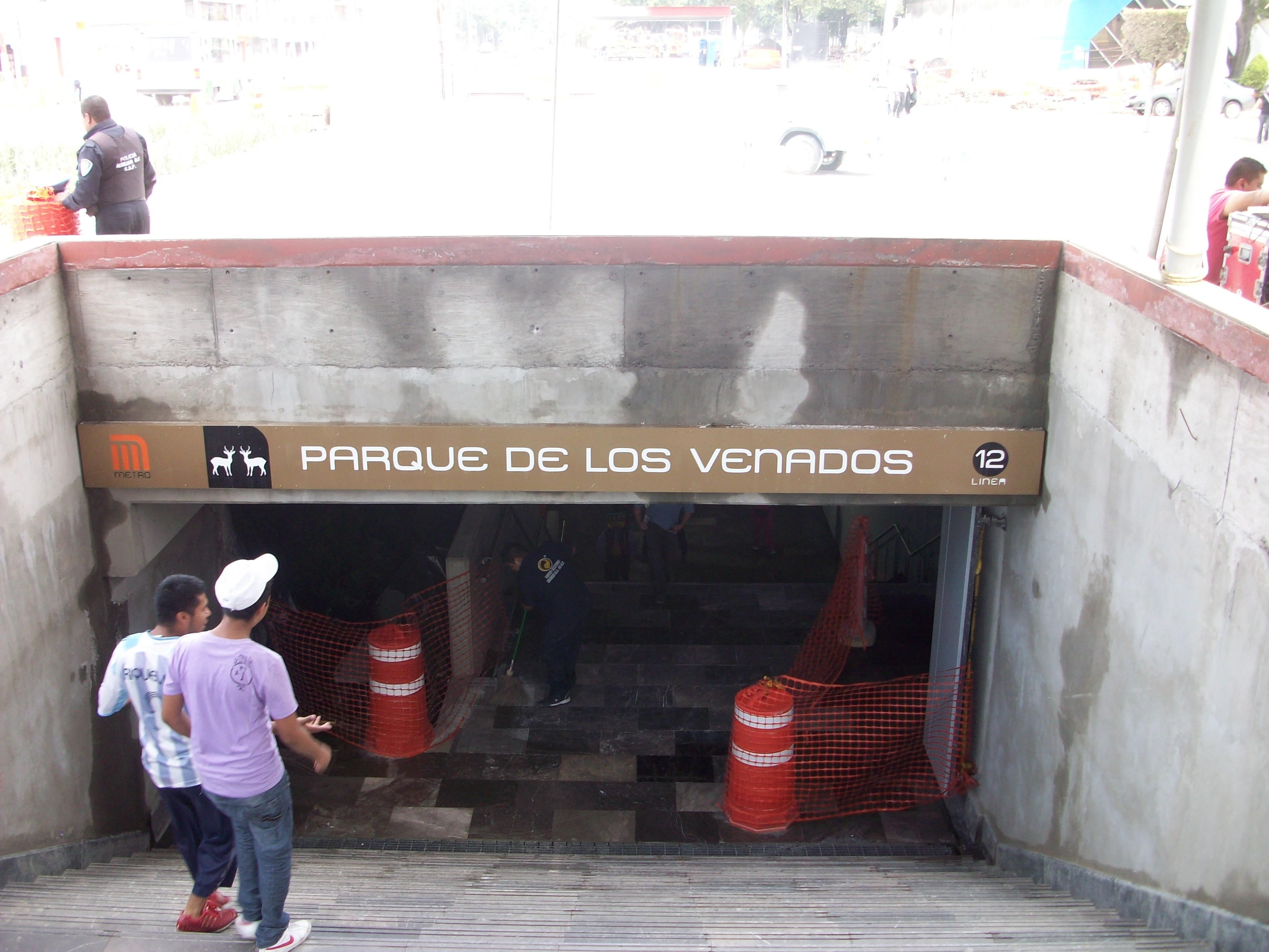 Acceso a la estacion